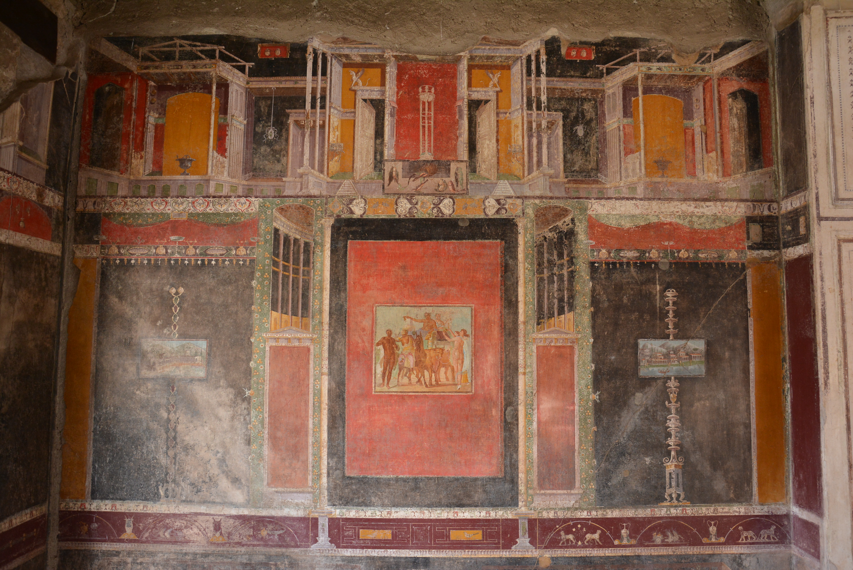 Casa di Marco Lucrezio Frontone - MIBACT This is a photo of a monument which is part of cultural heritage of Italy.